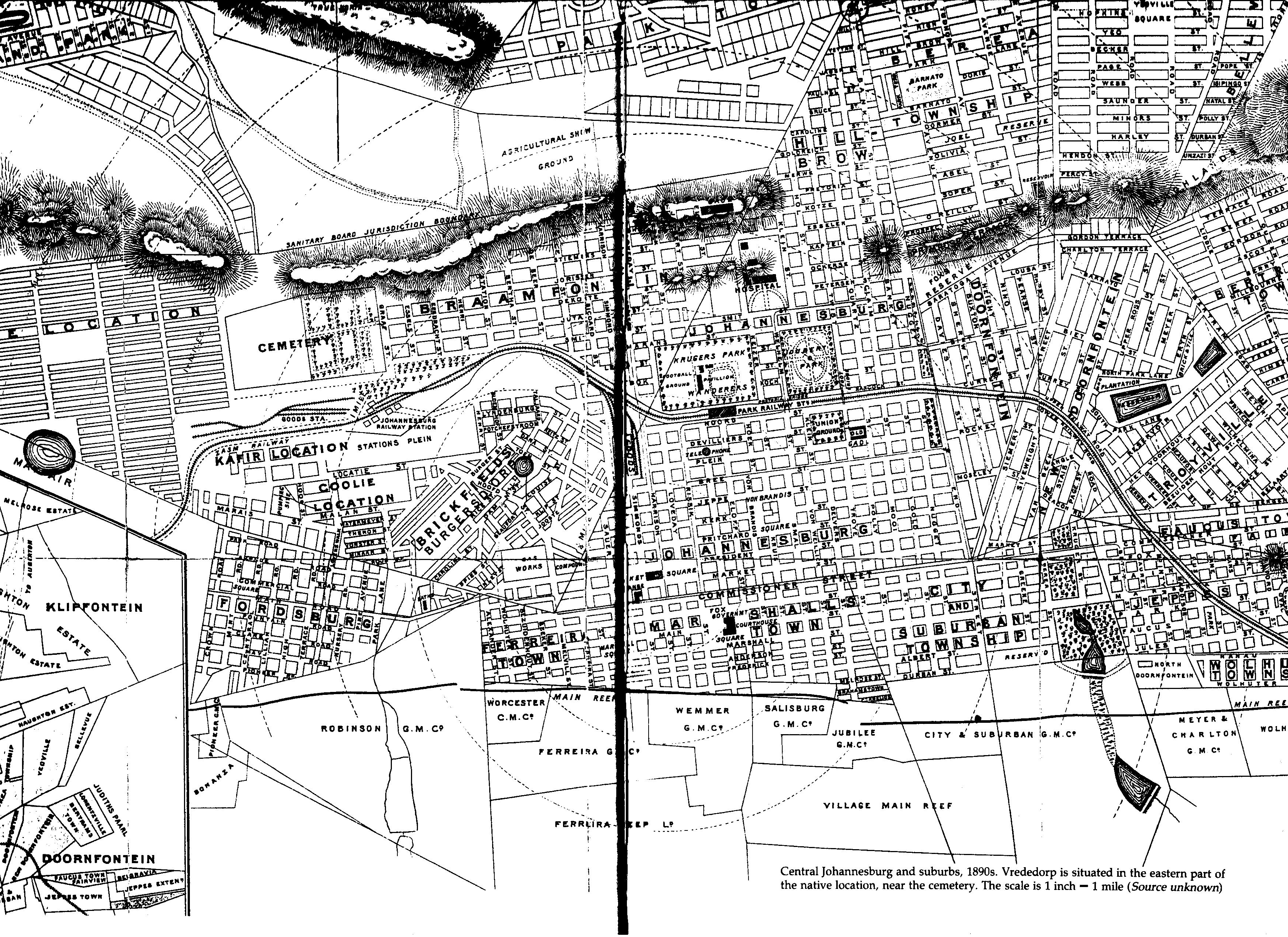 Map of Johannesburg, South Africa, in the 1890's